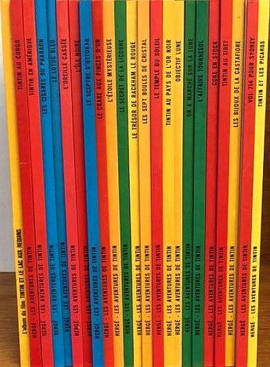 Les Aventures de Tintin (années 1970 à 2000).